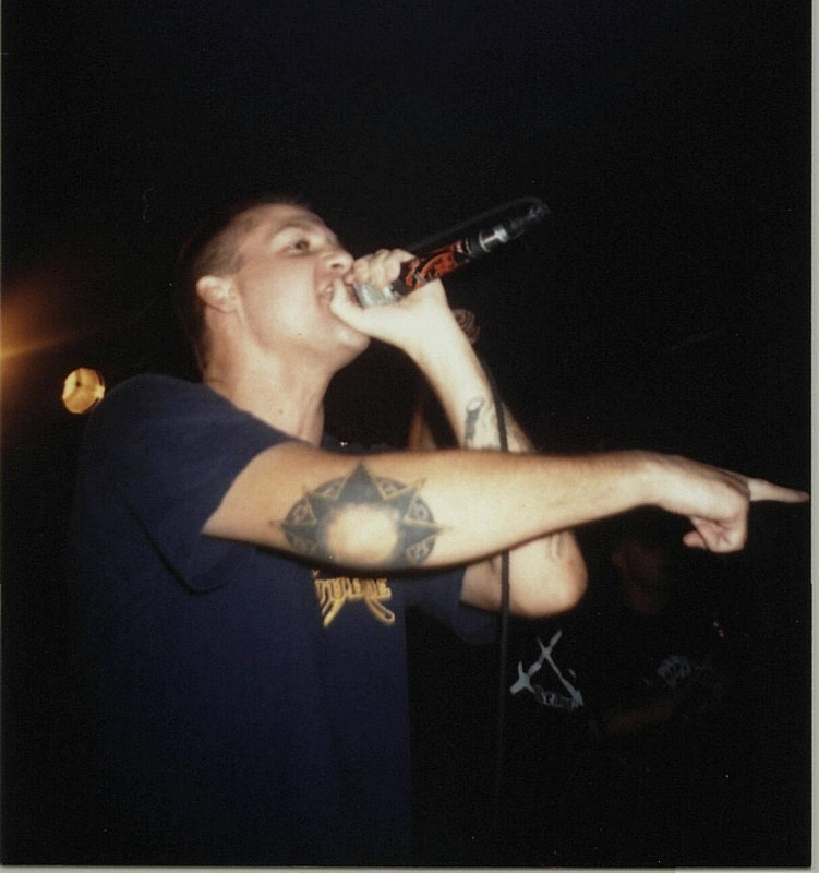 Scott Vogel 13.11.2003 Berlin